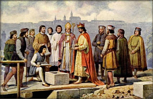 Josef Mathauser (1846-1917) - Karel IV. pokládá základní kámen k novému mostu